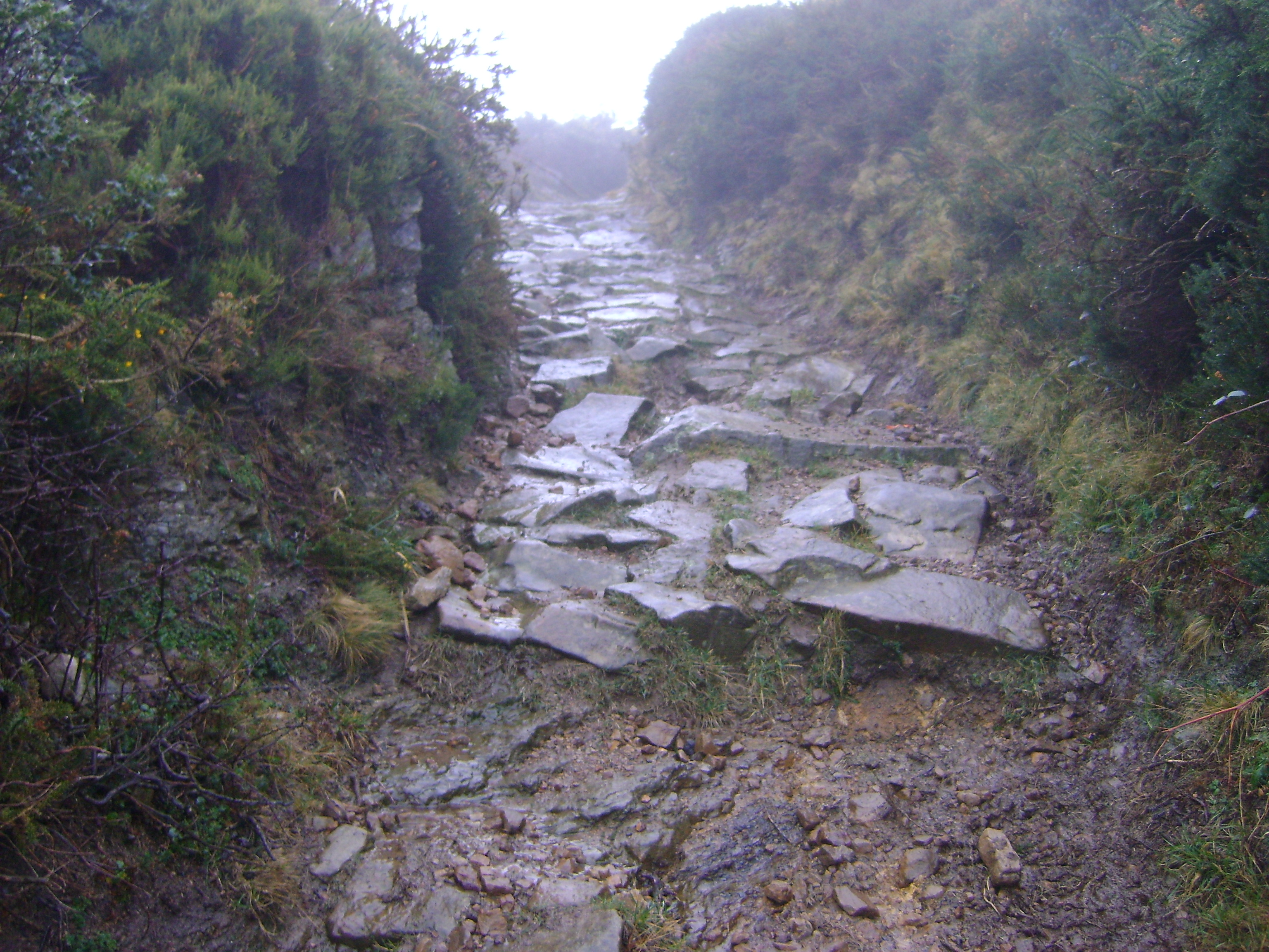 valle de iguña desde el pico jano